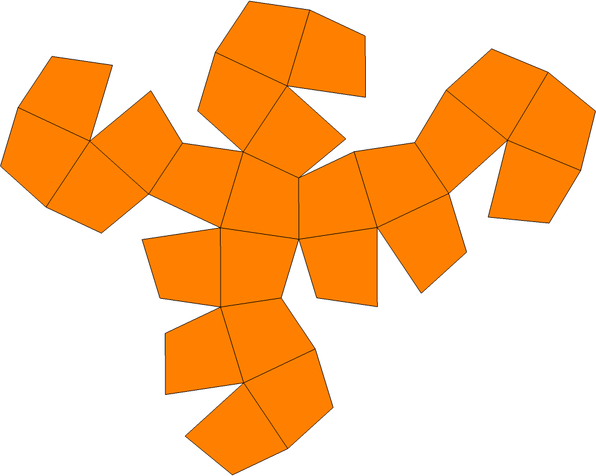 Deltoidalicositetrahedron net